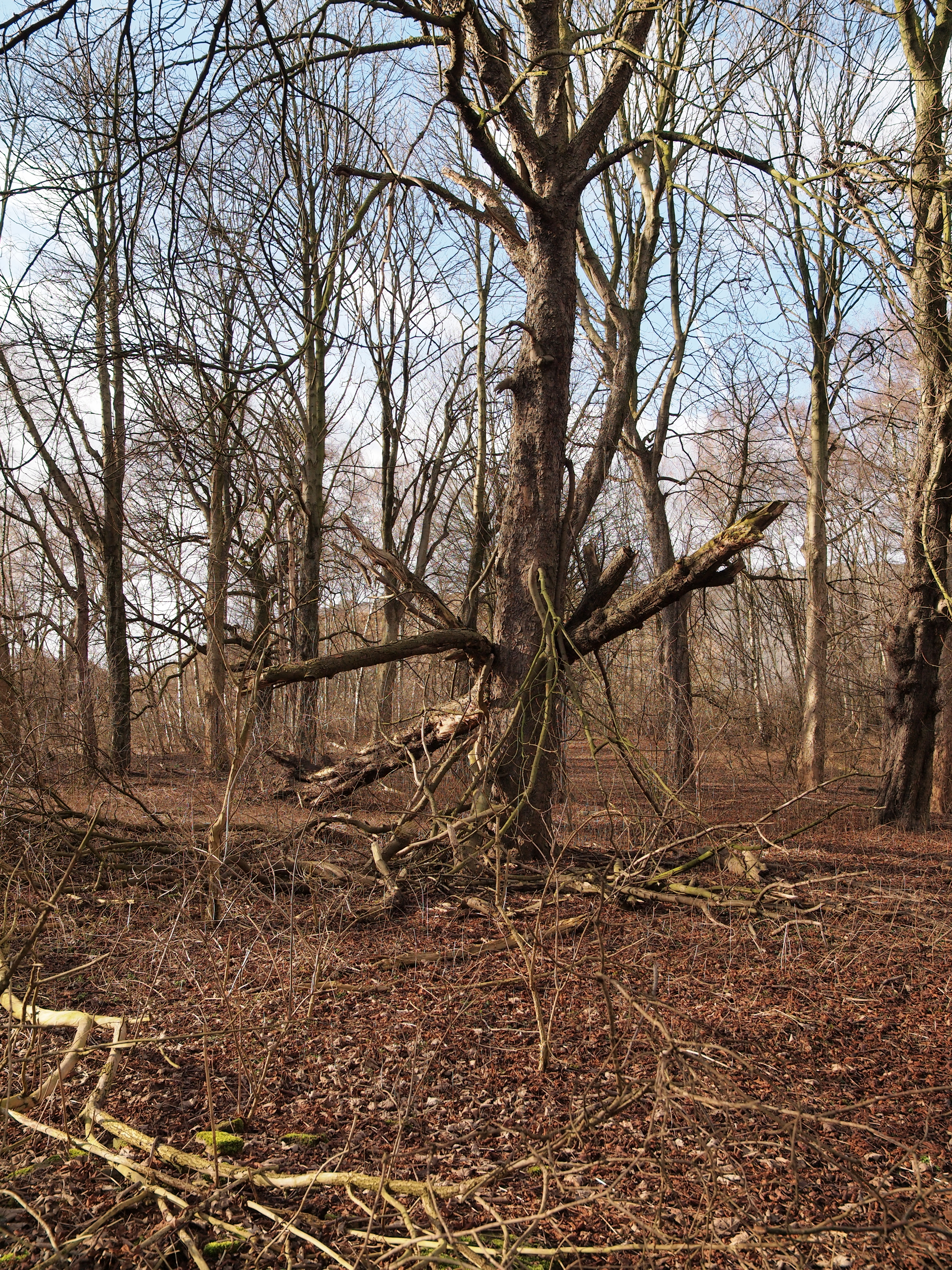 Naturschutzgebiet Grimberg in Gelsenkirchen (GE002), Stadtgrenze zu Herne, Totholz, im Hintergrund Aufhaldungen von Recyclingmateriel im Hafen Grimberg